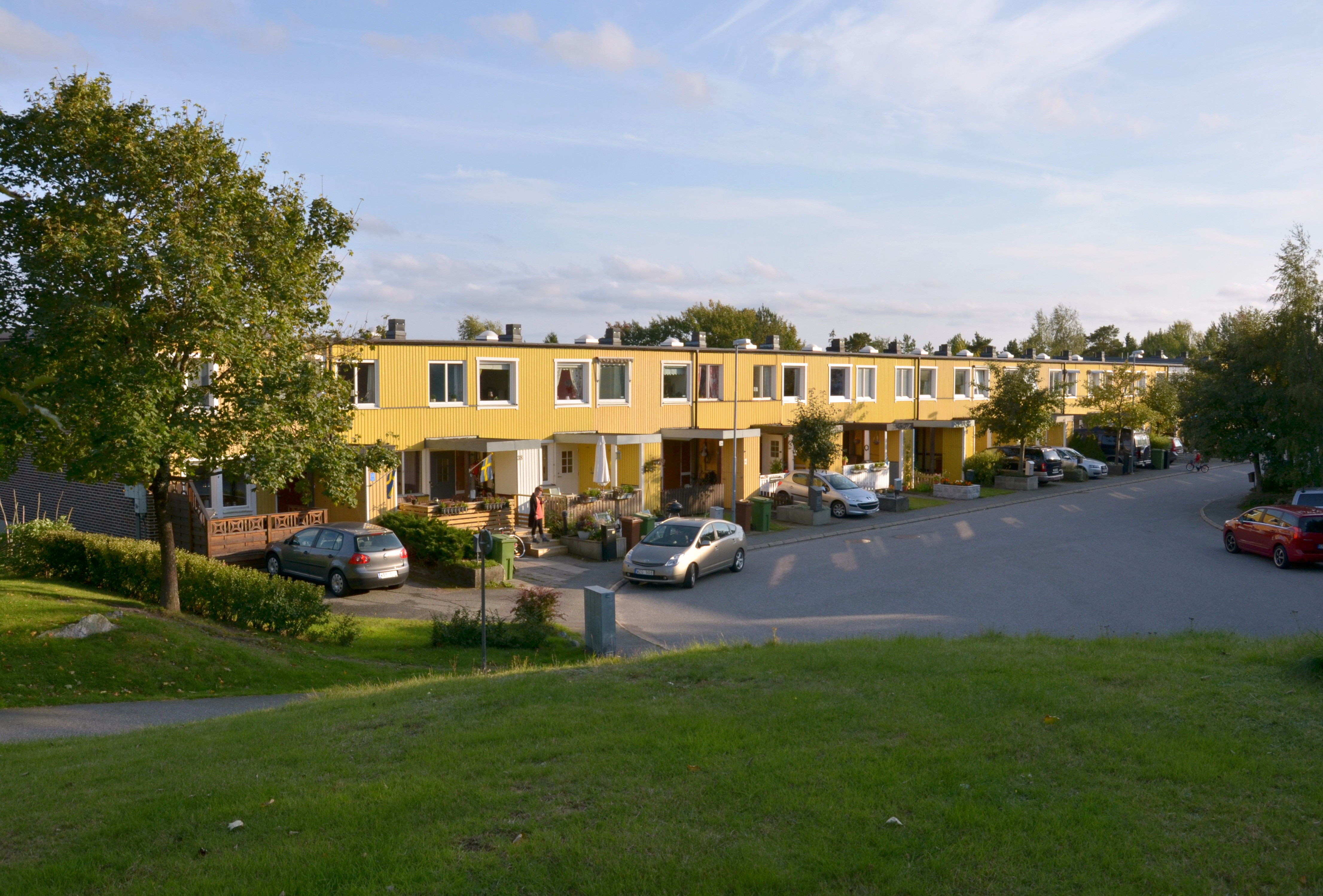 Flugsvampsvägen i Sörskogen, Huddinge, arkitekt FFNS arkitektkontor.